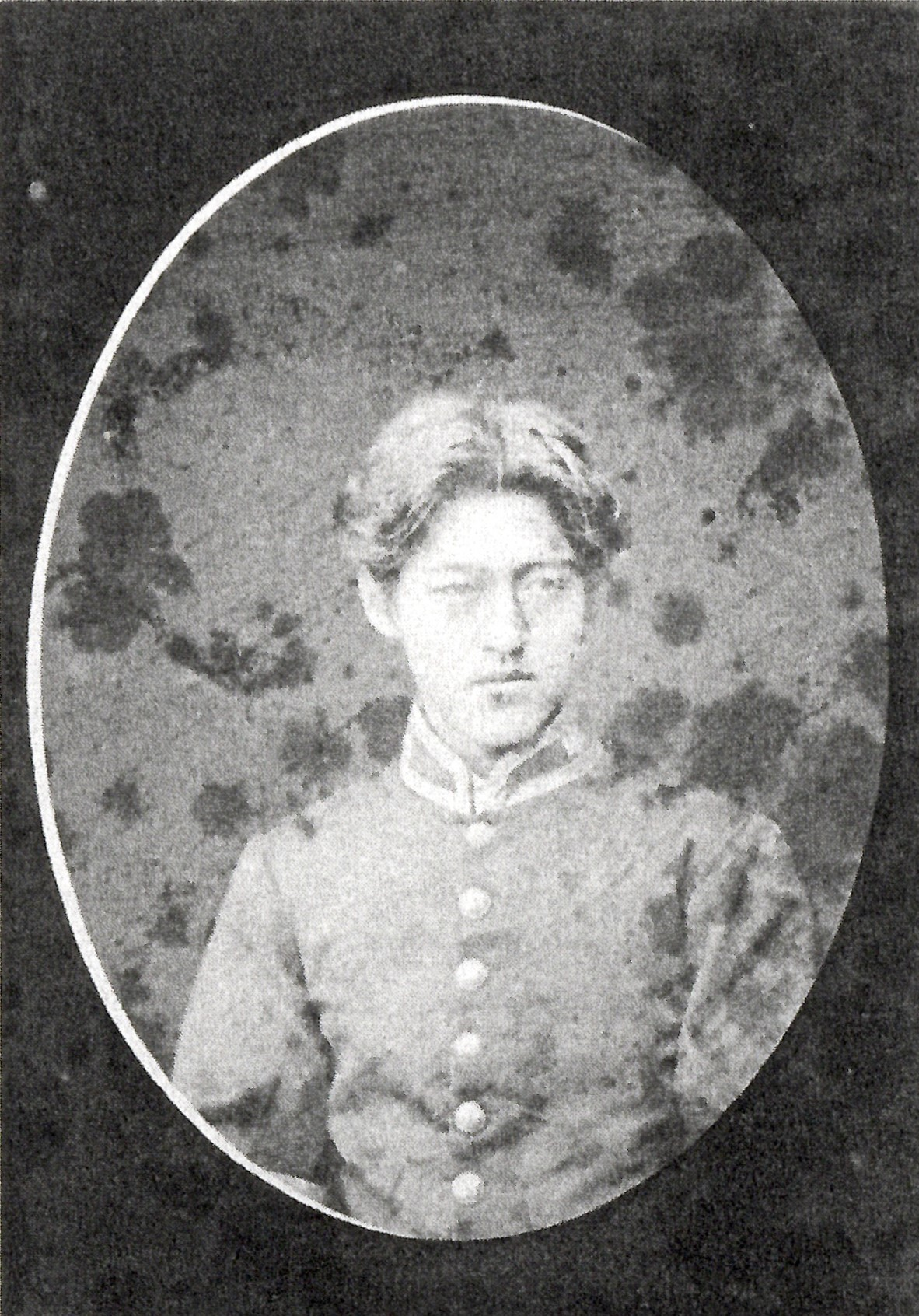 安藤直行の肖像写真。